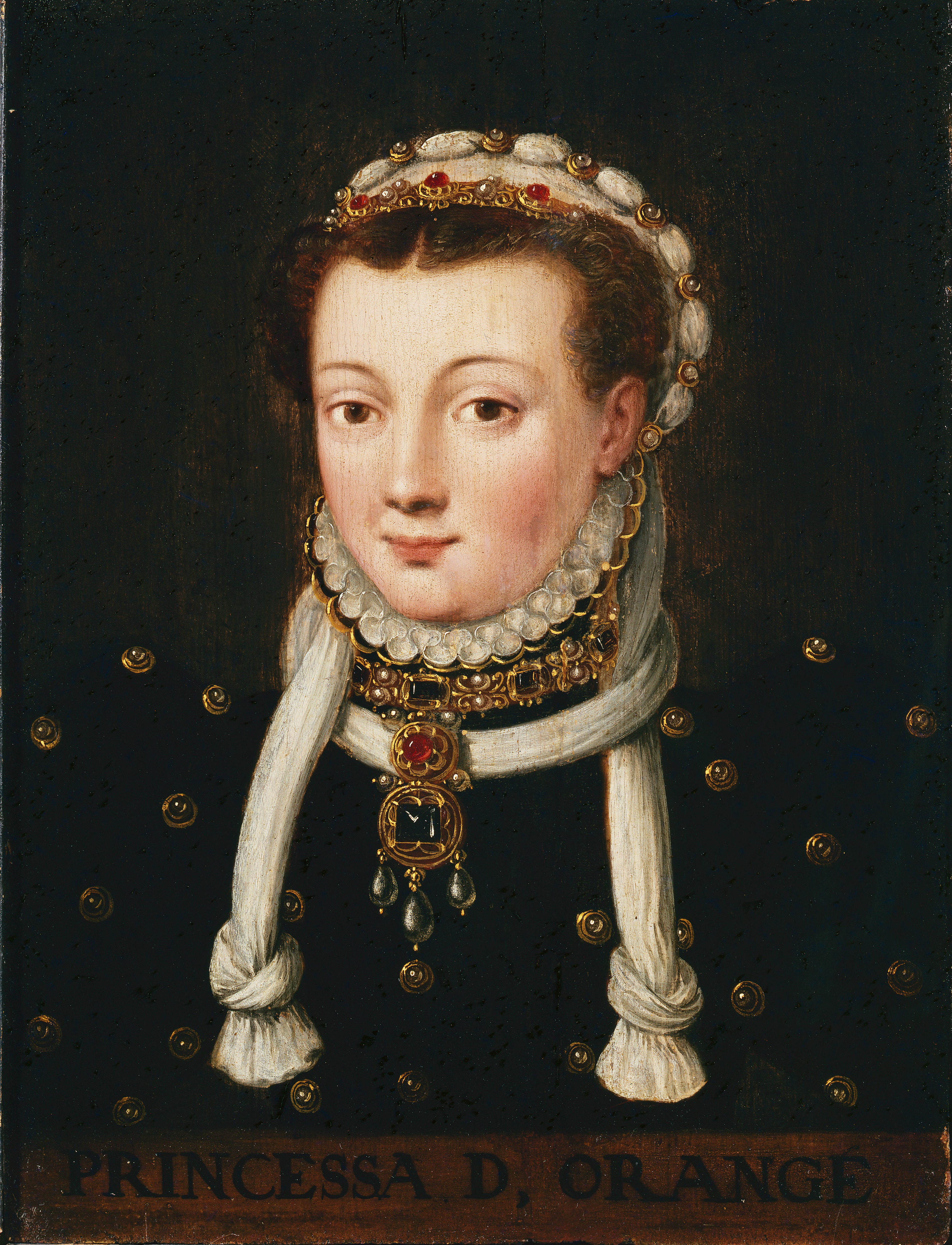 Anna van Egmond, prinses van Oranje (1533-1558)